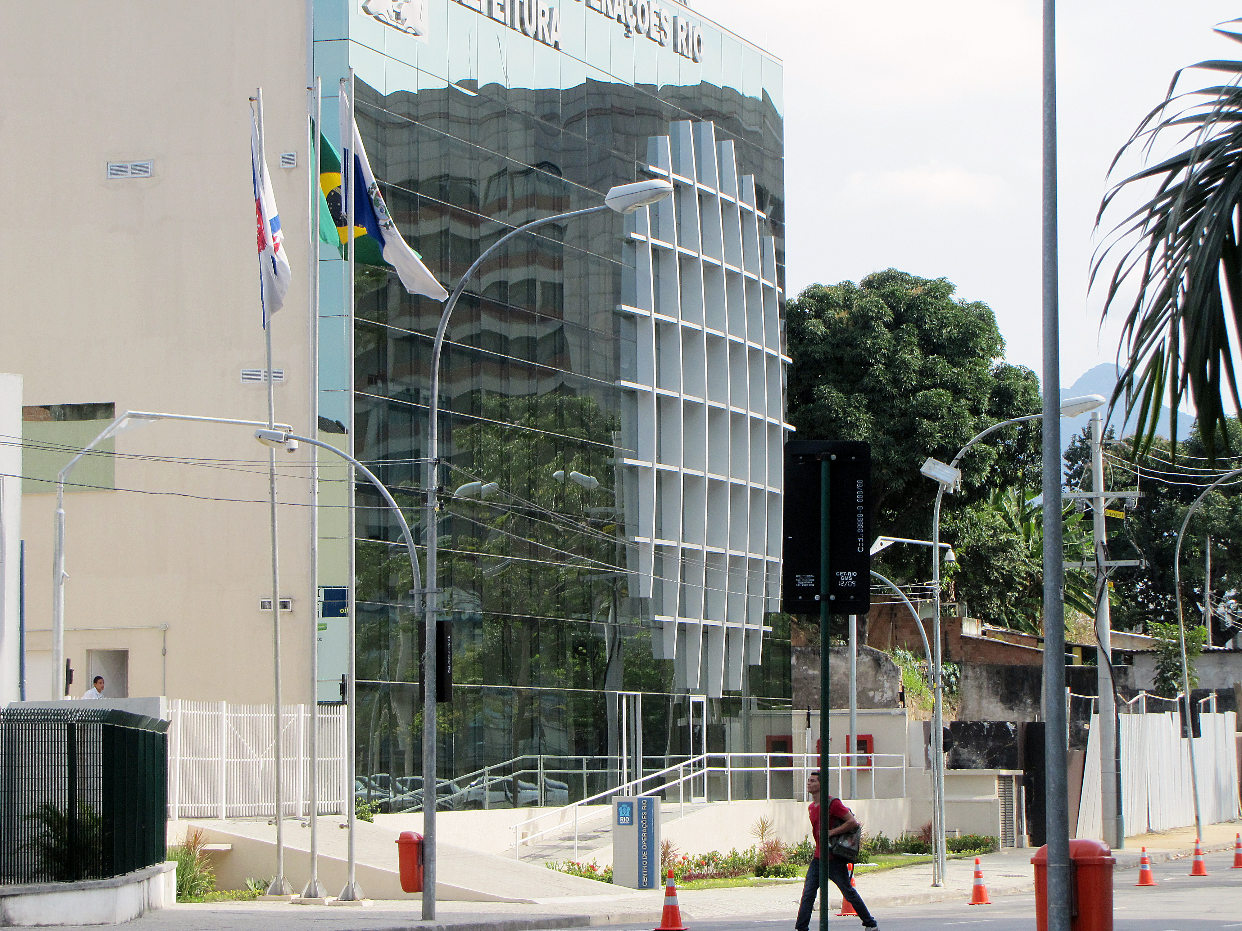 Prédio do Centro de Operações Rio, Prefeitura. Cidade Nova